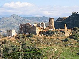 Castello Poggiodiana di Ribera, Agrigento, Sicilia